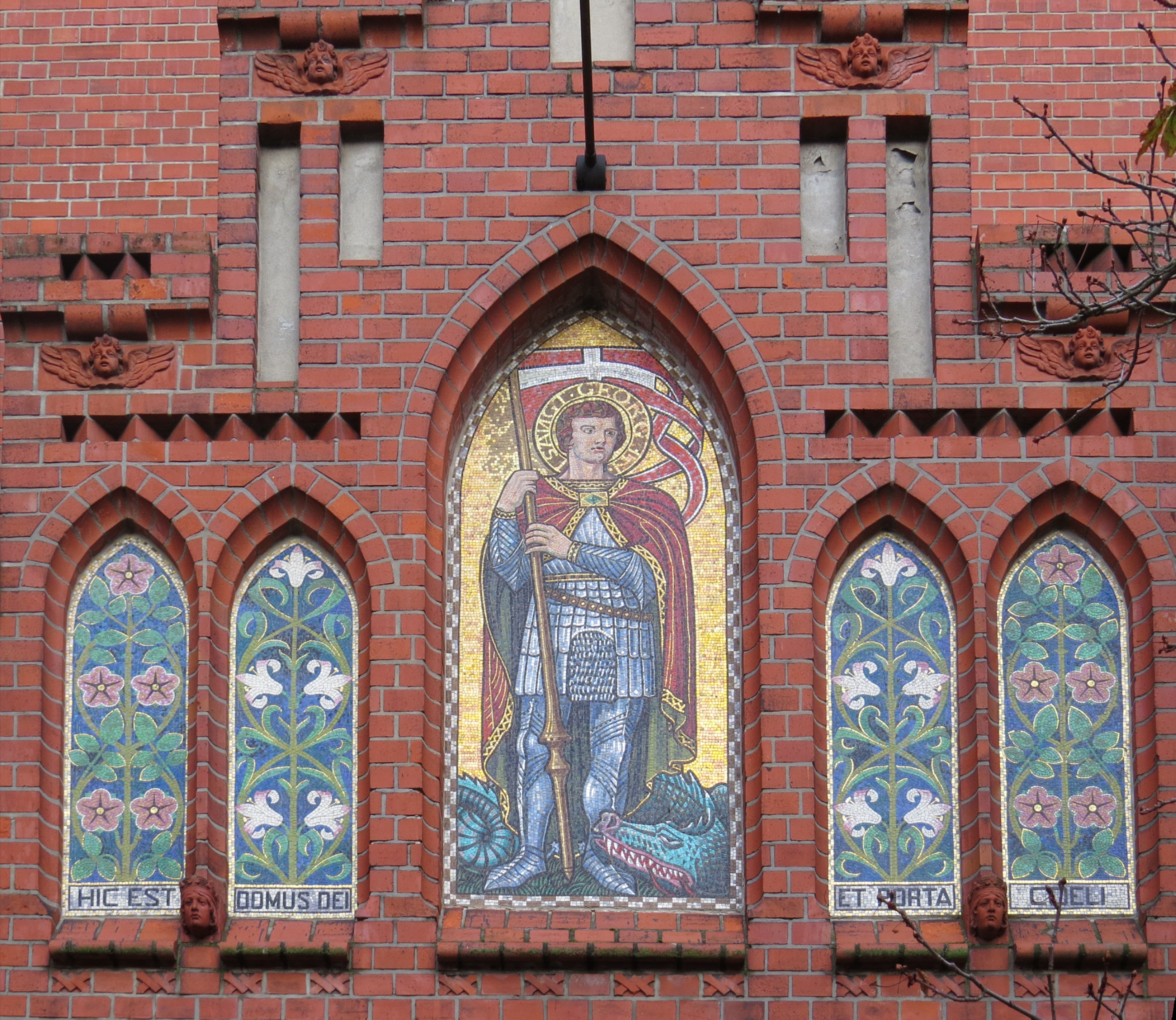 Kirche St. Georg, Berlin-Pankow, Mosaikbild St. Georg